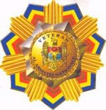 Медаль Республики Молдова "Ветеран Вооружённых сил Республики Молдова"